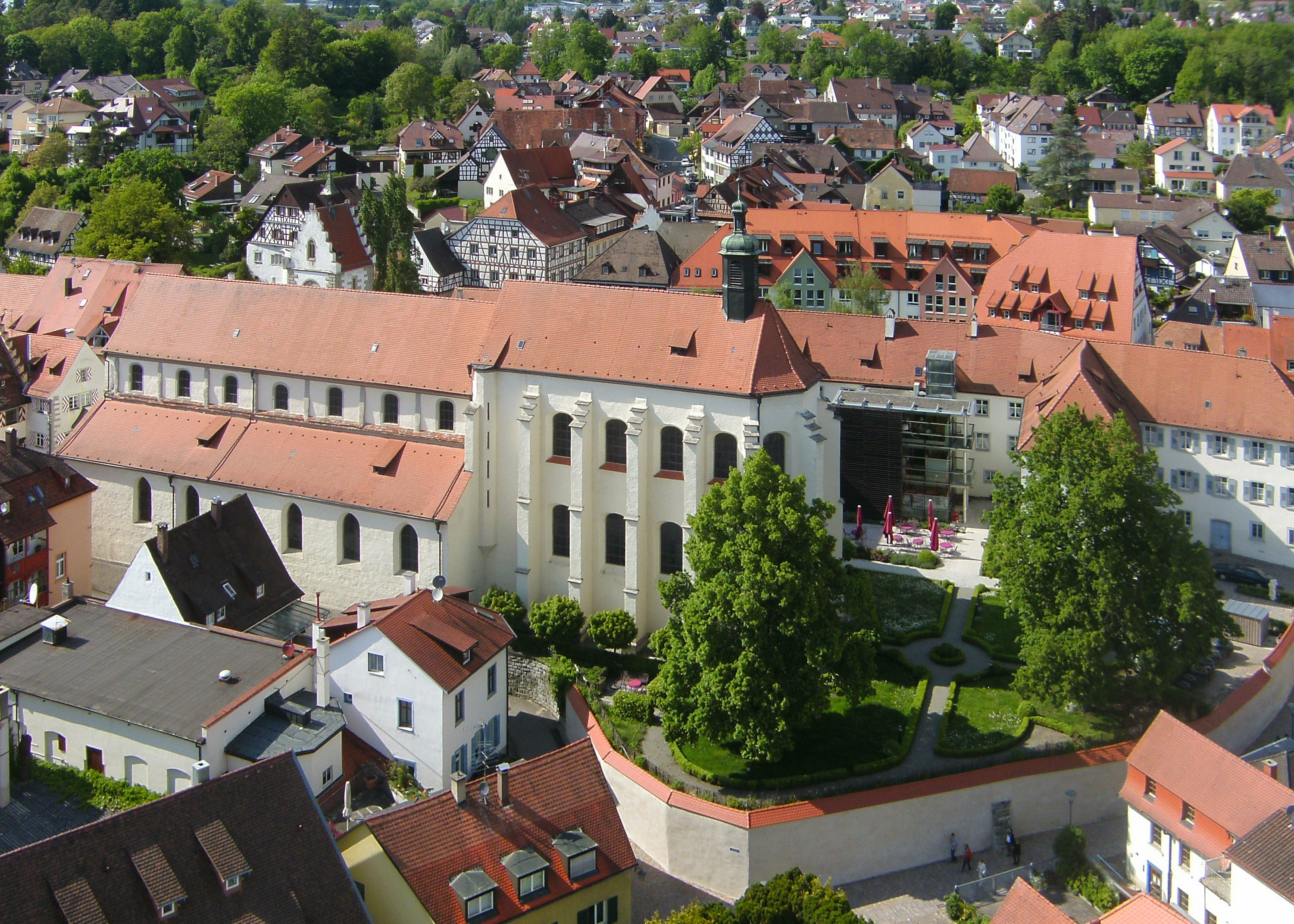 Franziskanerkirche